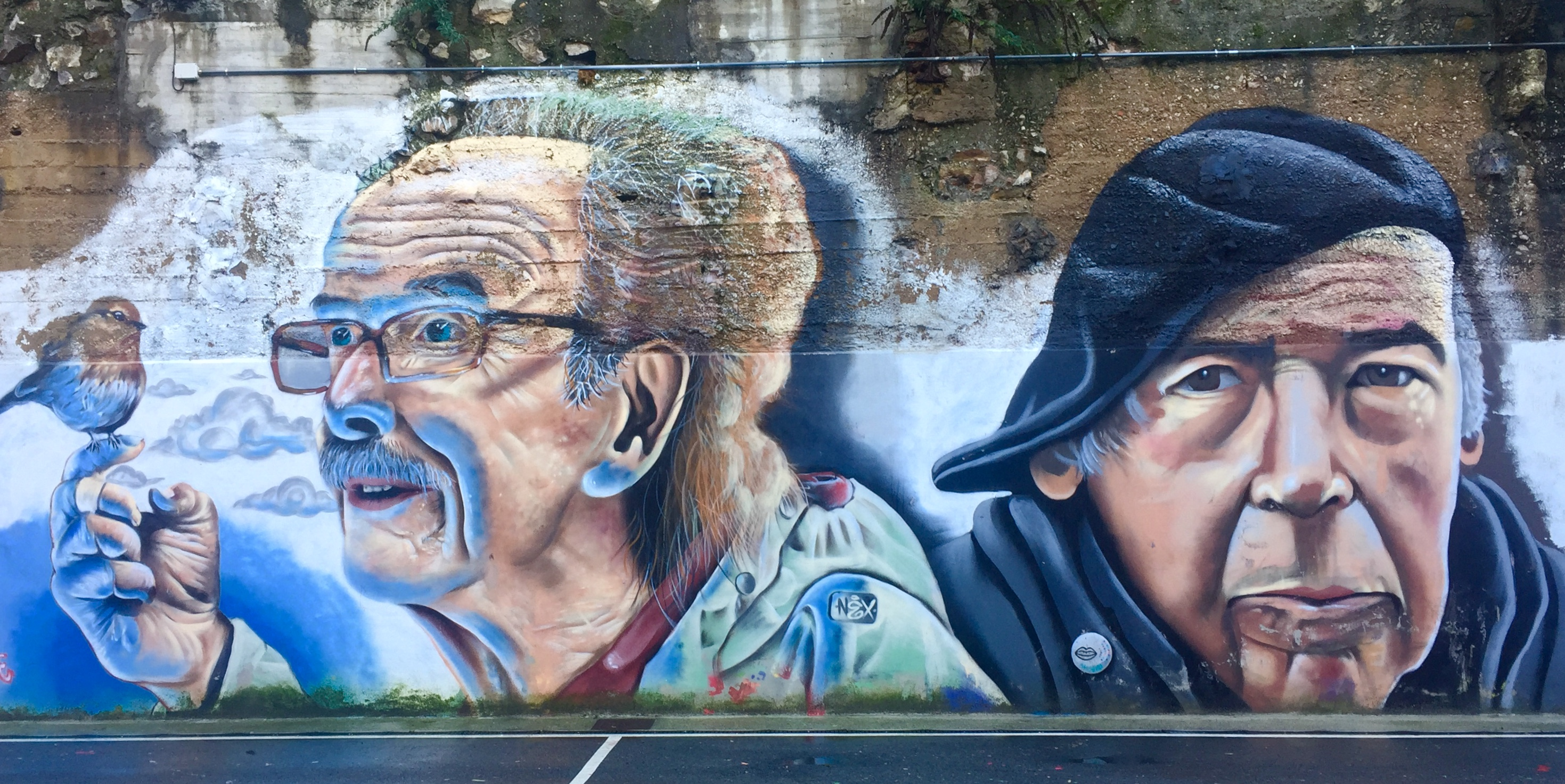 Ohore Artze eta Laboari, Proisa graffitin